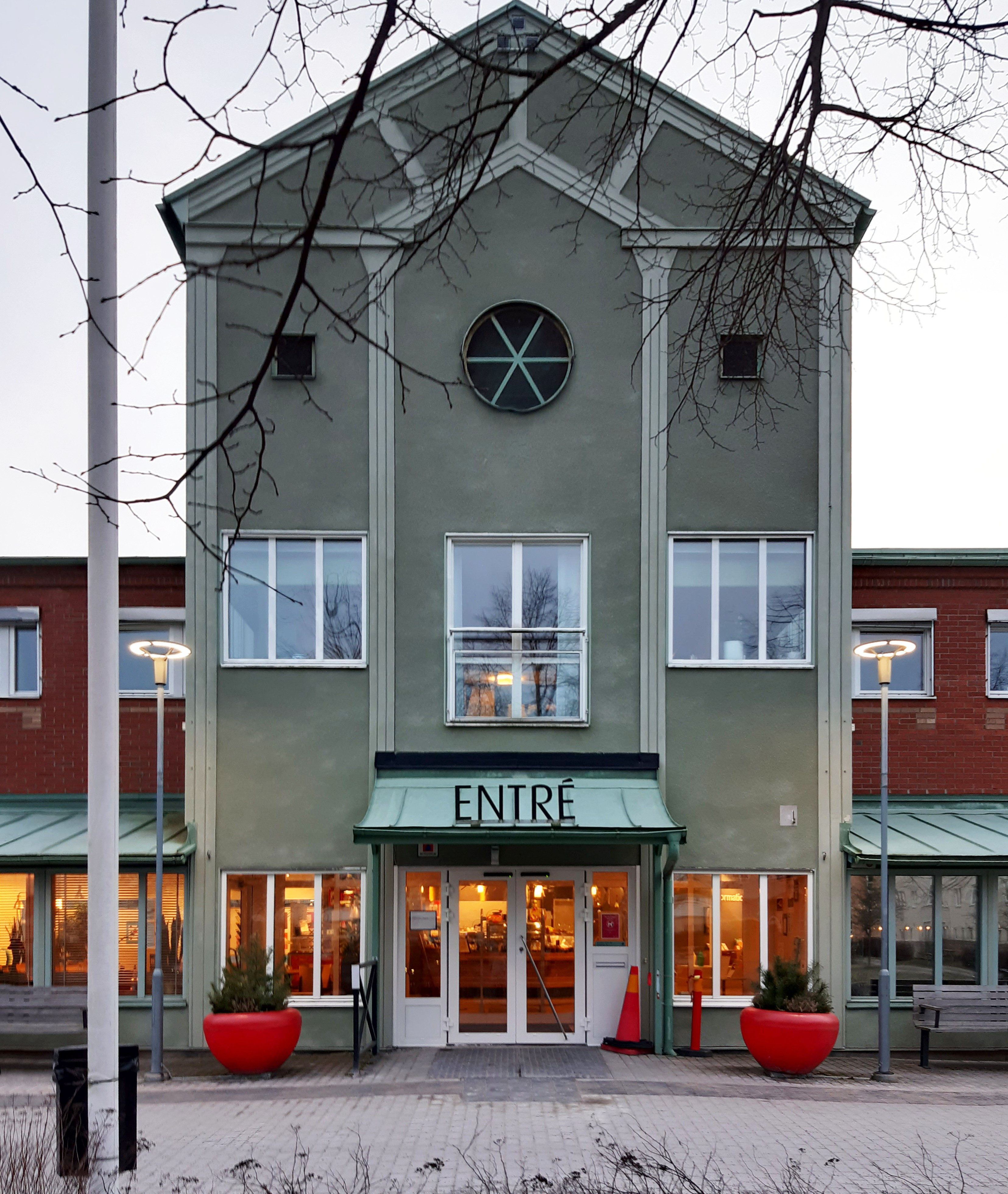 Entrén till Kulturhuset Ängeln i Katrineholm